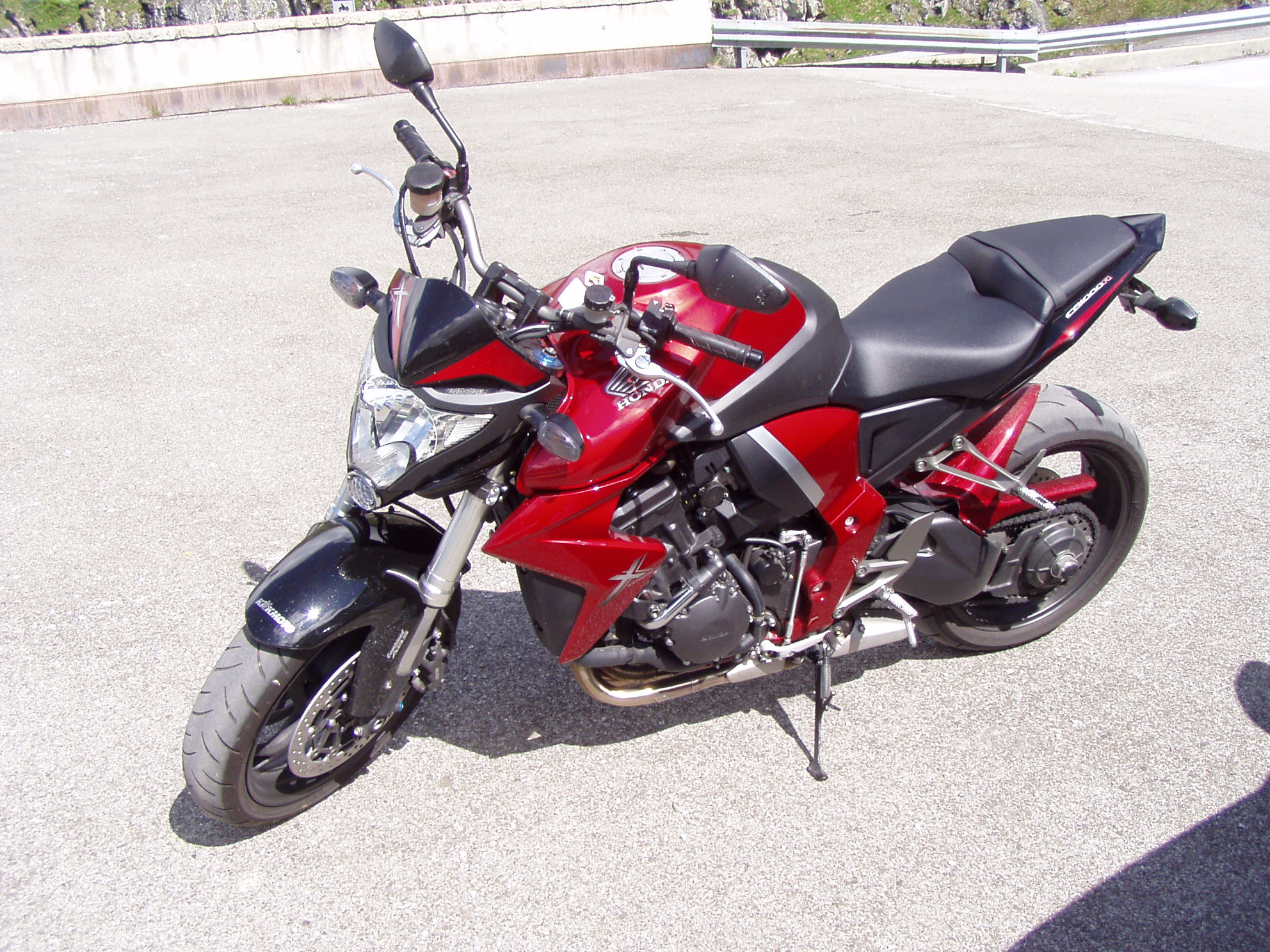 Honda CB 1000R